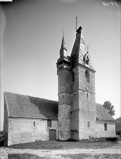 Église Sainte-Blaise de la Chaussée-d'Ivry, Eure-et-Loir (France).